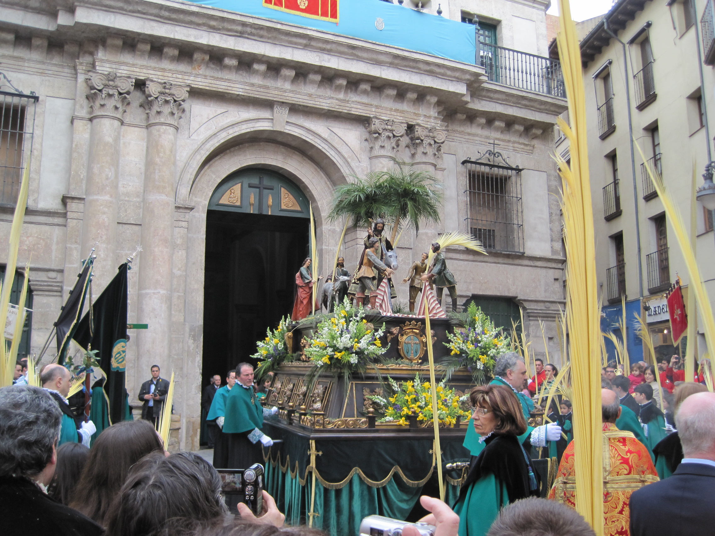 Paso de La Entrada Triunfal de Jesús en Jerusalén. Cofradía Penitencial de la Santa Vera Cruz, Valladolid (España).